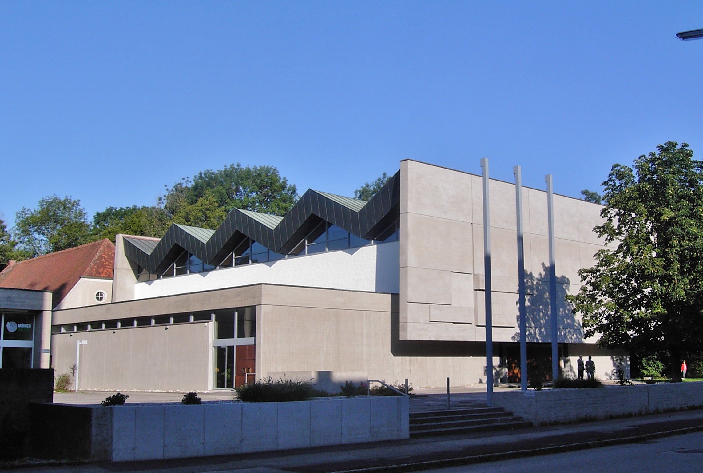 Steyr Karl Punzer-Straße 45, Neue Pfarrkirche Münichholz und Pfarrzentrum